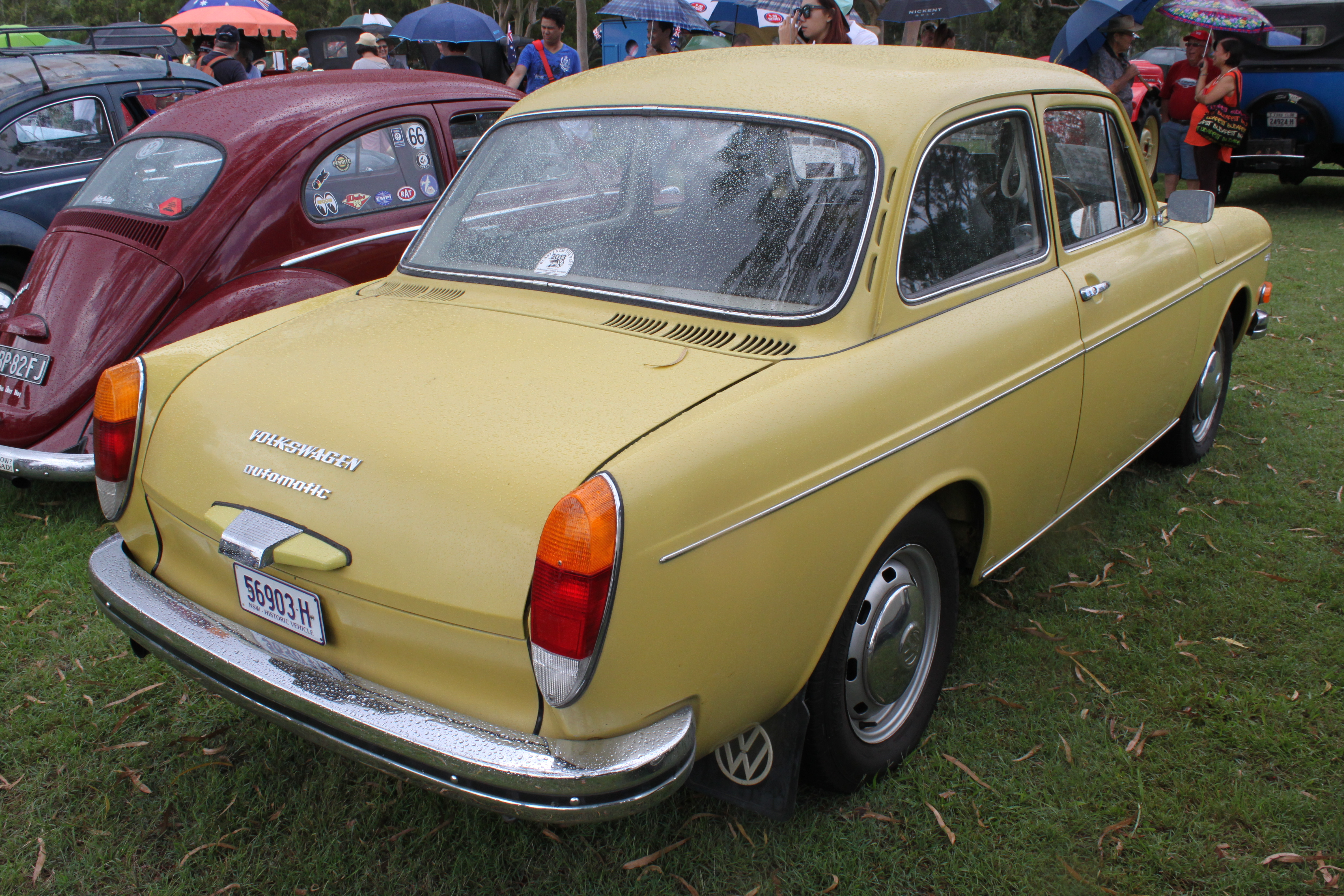 CARnivale, Parramatta Park, NSW Australia Day 2016